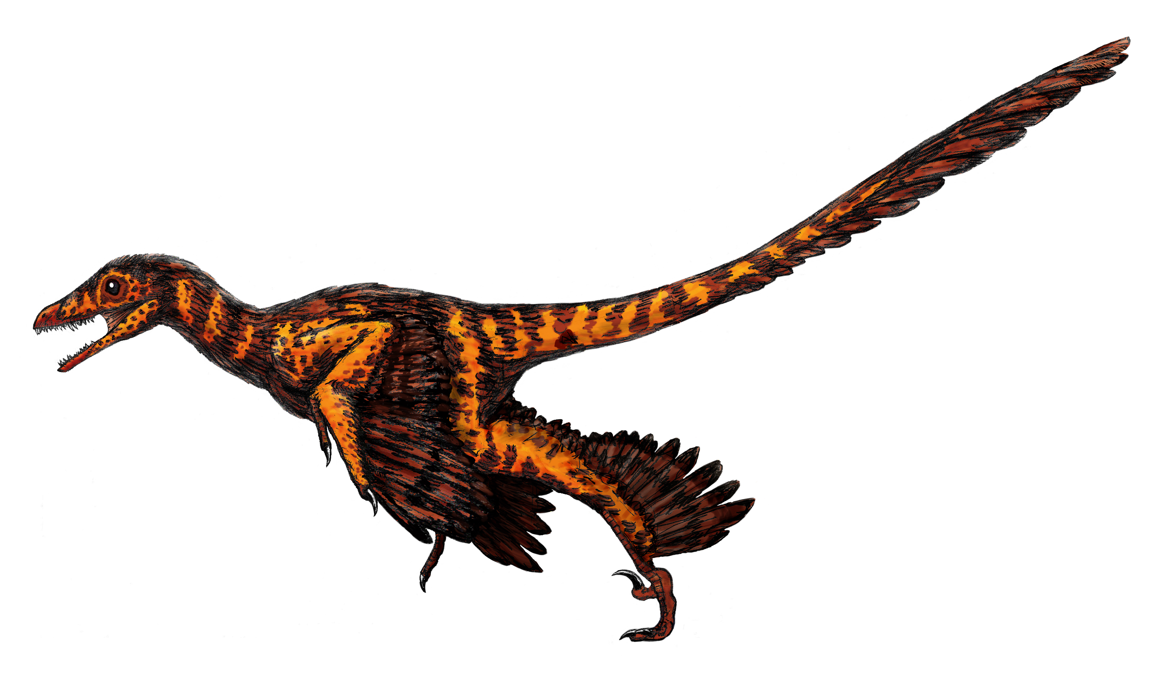 Sinornithosaurus millenii.